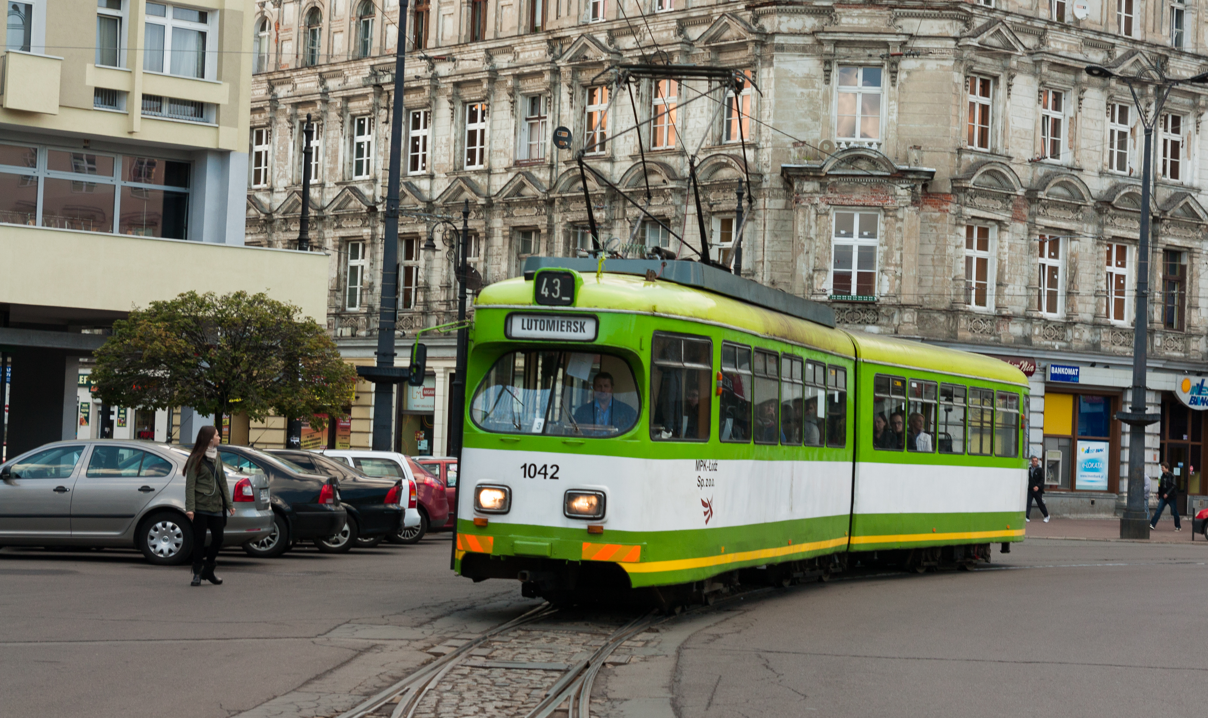 Plac Wolności w Łodzi